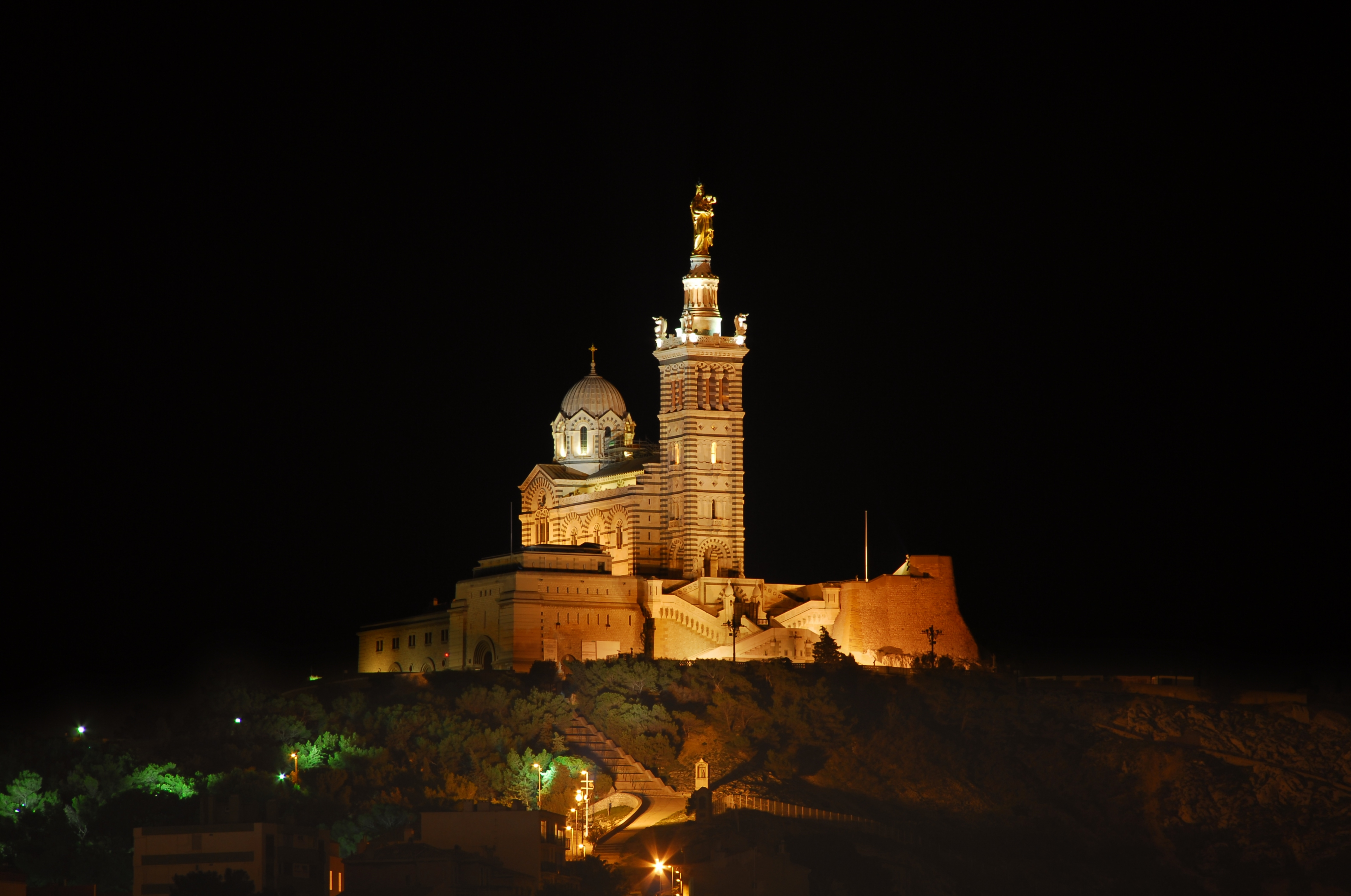 Notre Dame de la Garde, Marseille, at Night